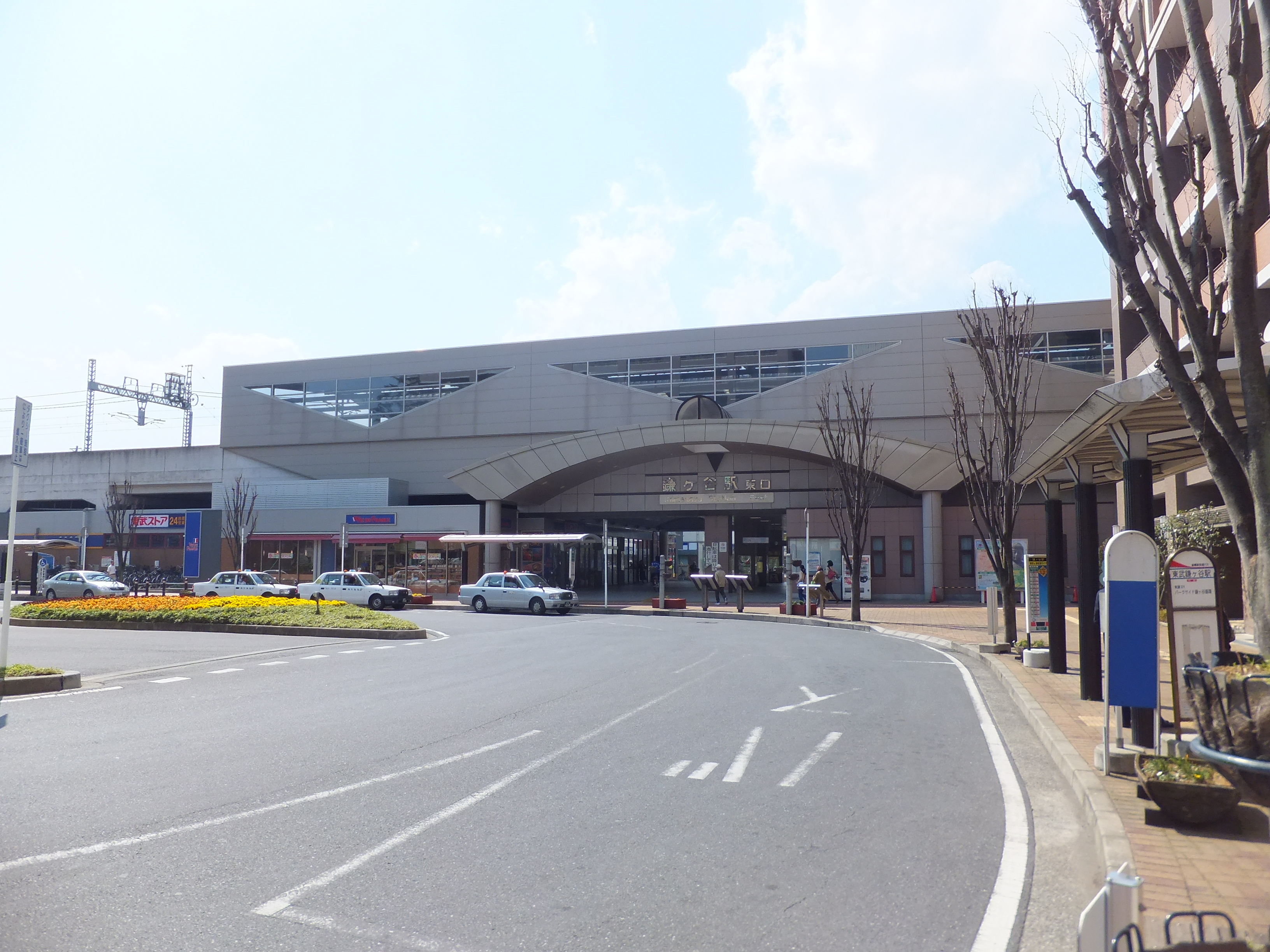 東武野田線鎌ヶ谷駅東口駅前広場